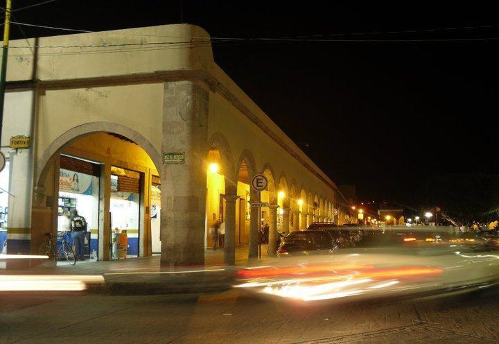 Jardín plaza de Uriangato.